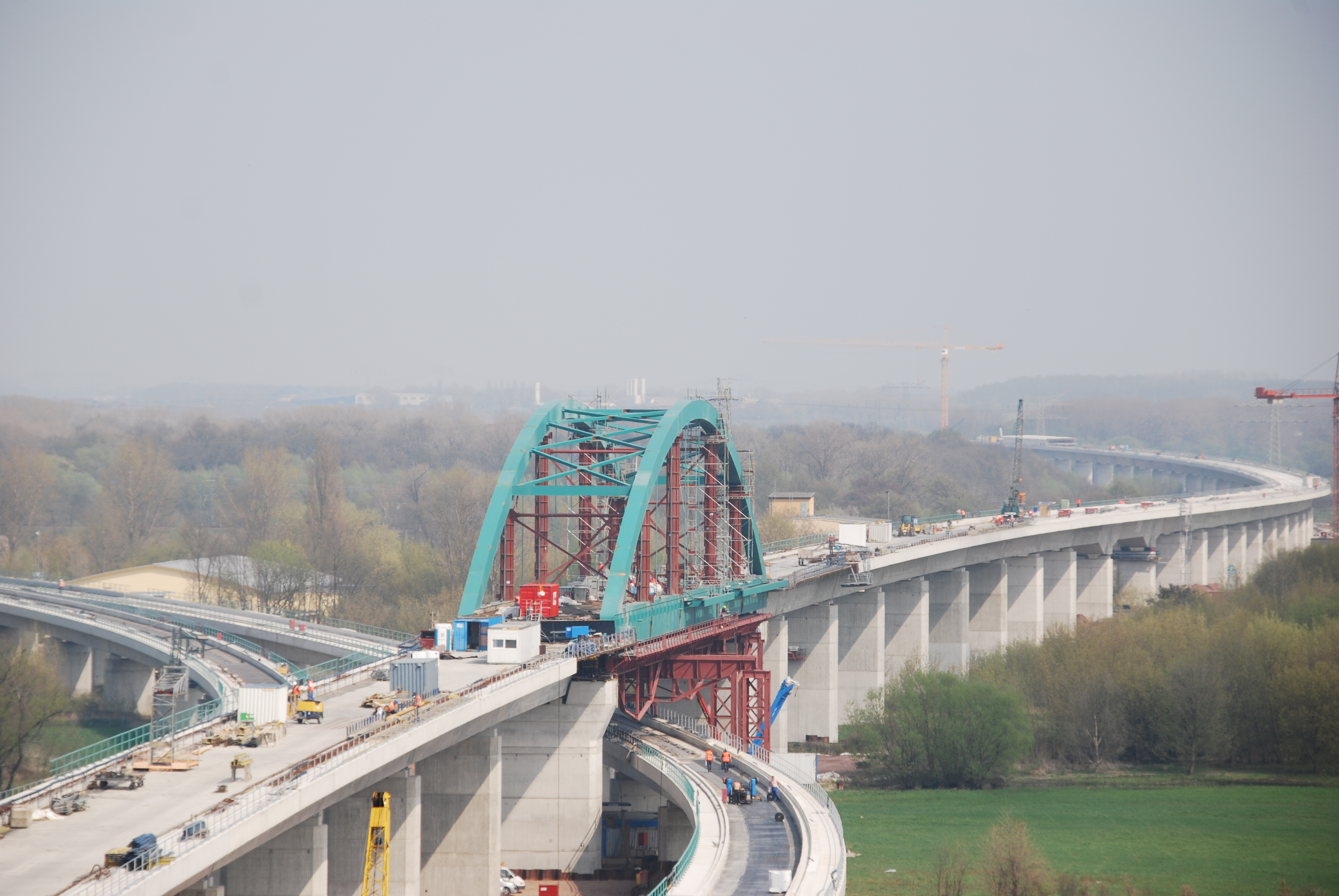 Saale-Elster-Talbrücke Kreuzungbauwerk Höhe Planena